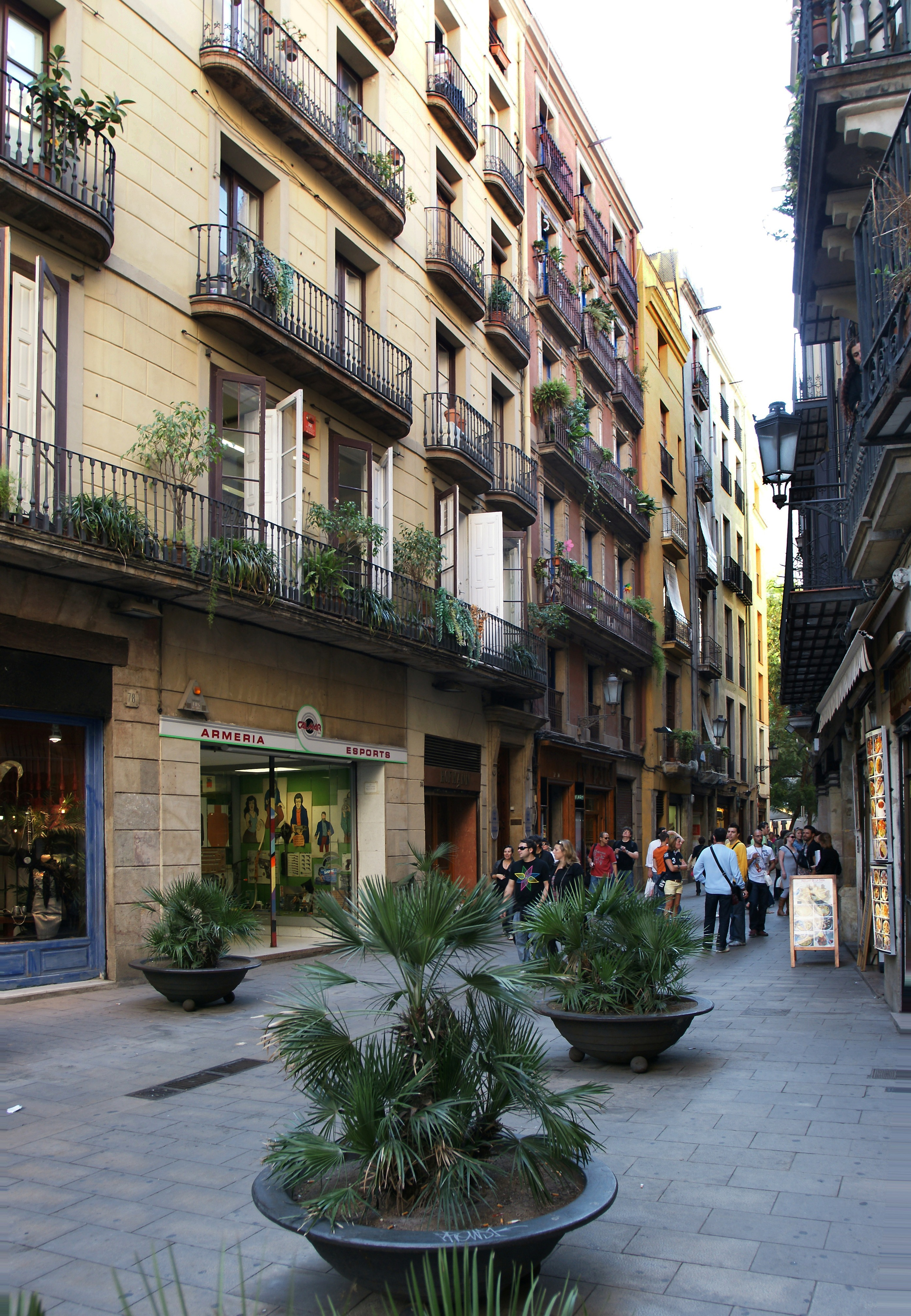 Blick von der Placa de Santa Maria del Mar in der Nähe des Hafen von Barcelona in die Carrer de l'Argenteria (eine Einkaufsstrasse).